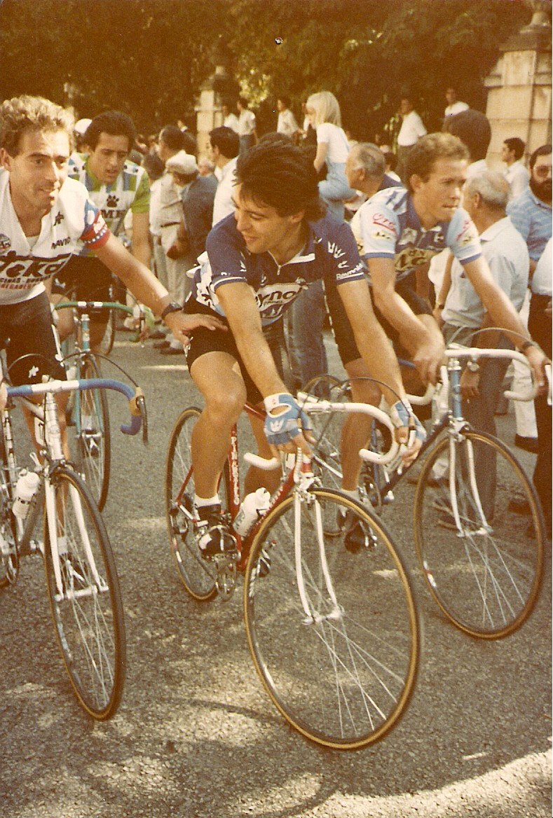 Carrera de un día en Soria. Octubre 1985.